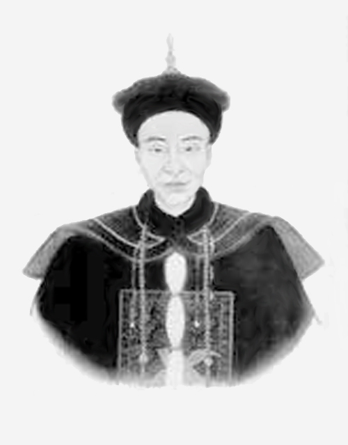 韩培森，清朝官员